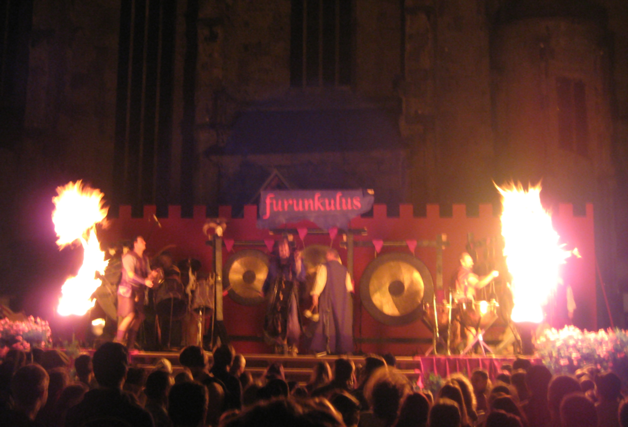 Auftritt der Band "Furunkulus" auf dem Nördlinger Stadtmauerfest 2007